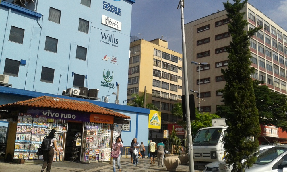 Vista parcial do bairro Vila Santa Cecília